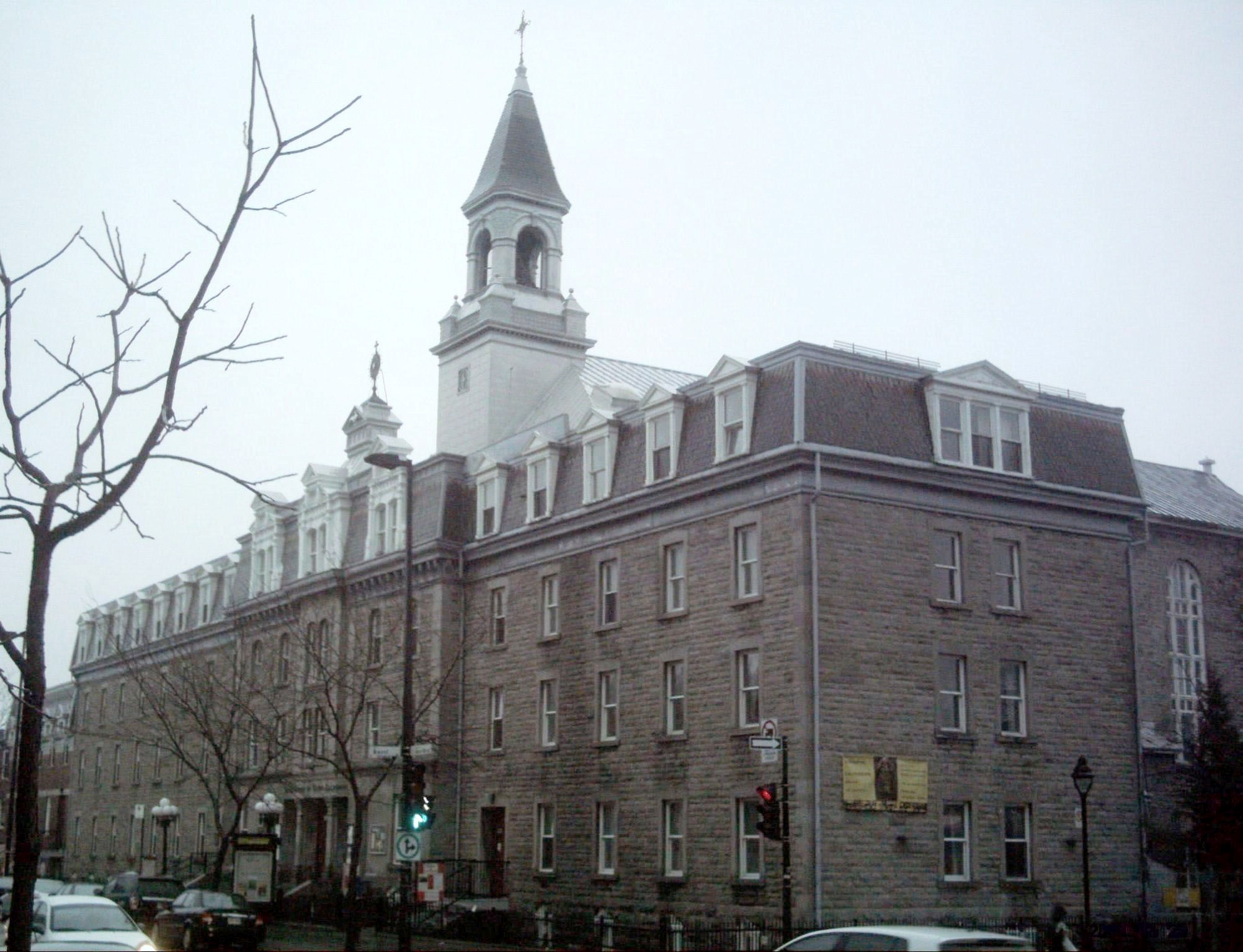 Sanctuaire du Saint-Sacrement à Montréal, au 500 avenue du Mont-Royal Est